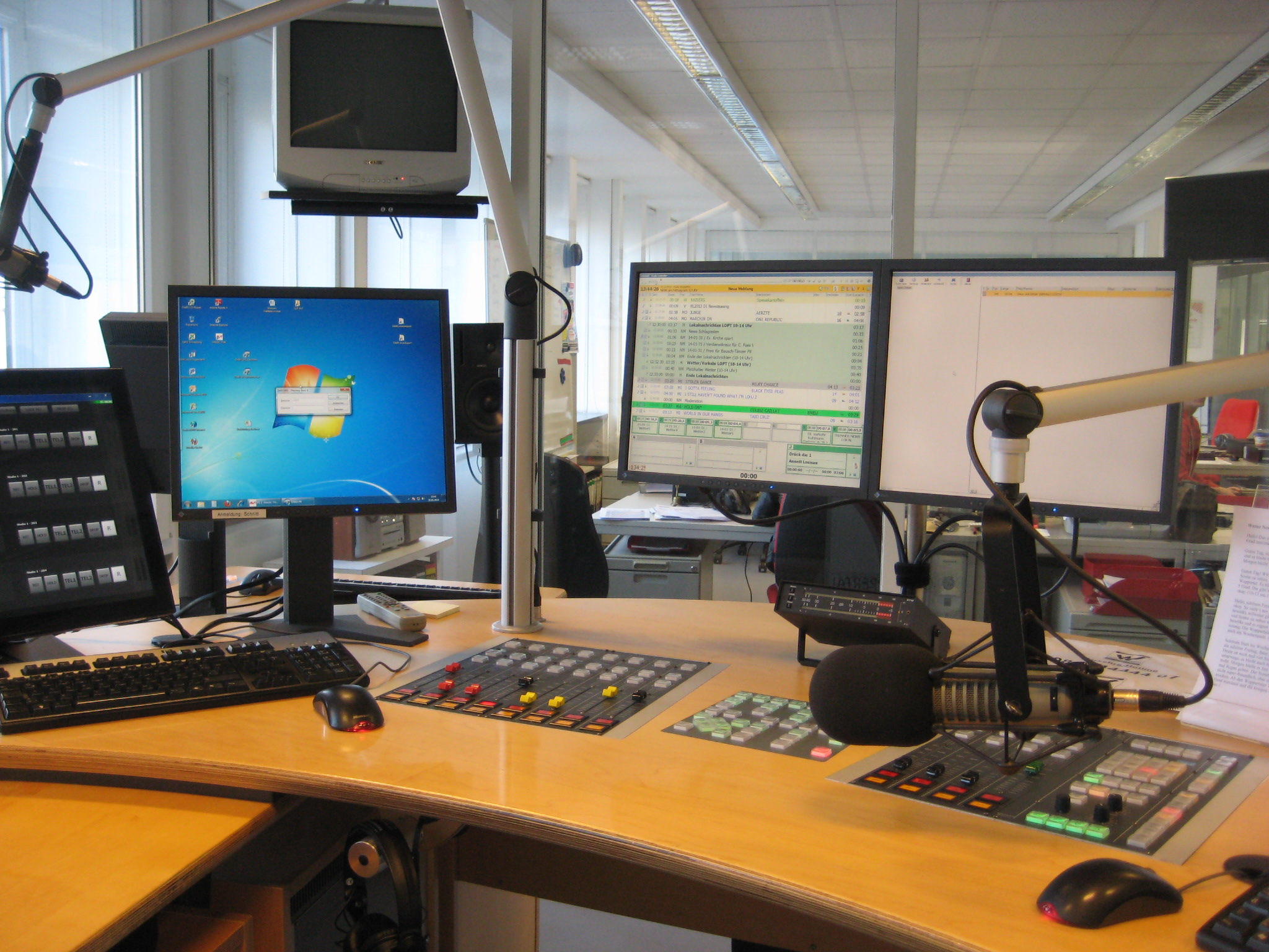 Radio Wuppertal Studiotechnik